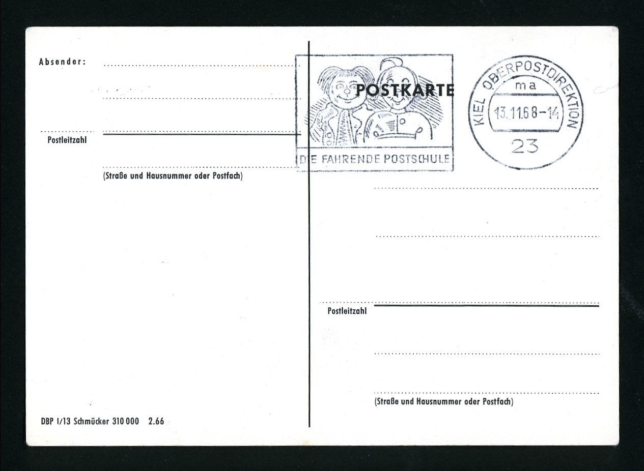 Stempel einer "Fahrenden Postschule"